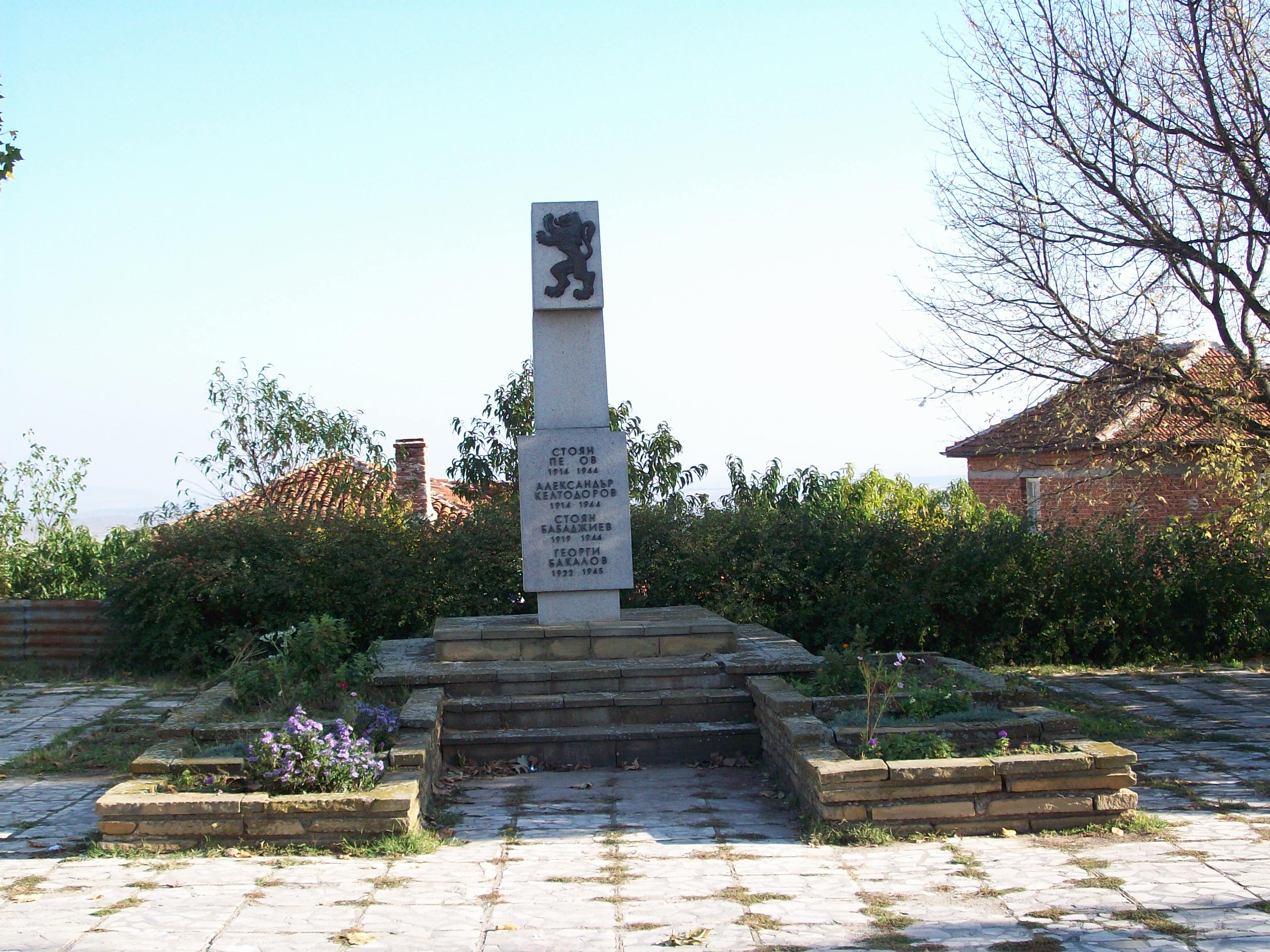 Паметник на загиналите в Отечествената война